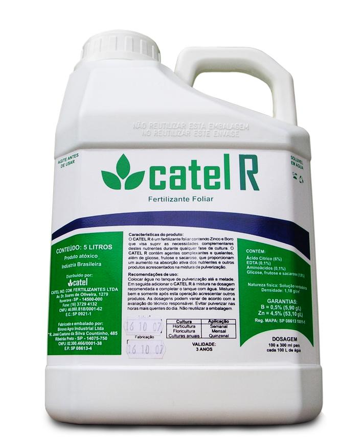 foto galão 5L Catel R